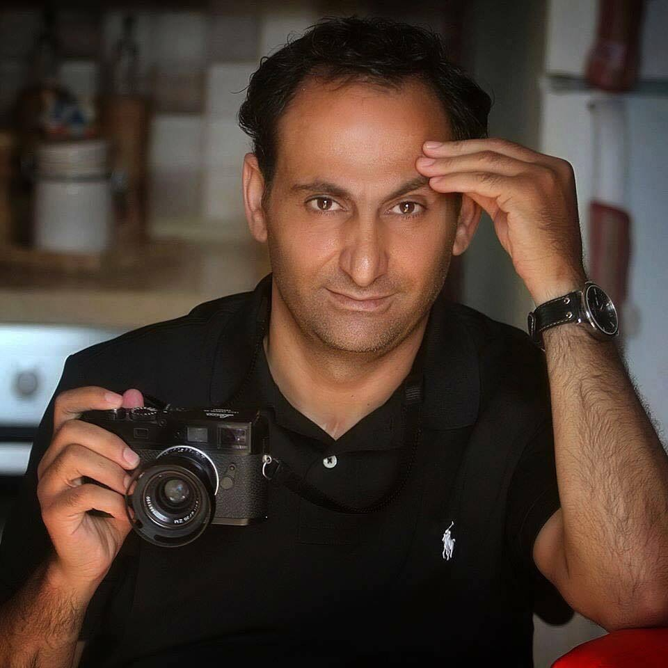 أسامة السلوادي